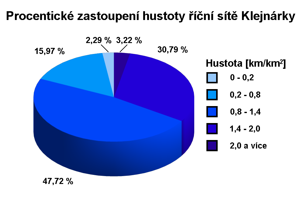 Procentické zastoupení hustoty říční sítě Klejnárky